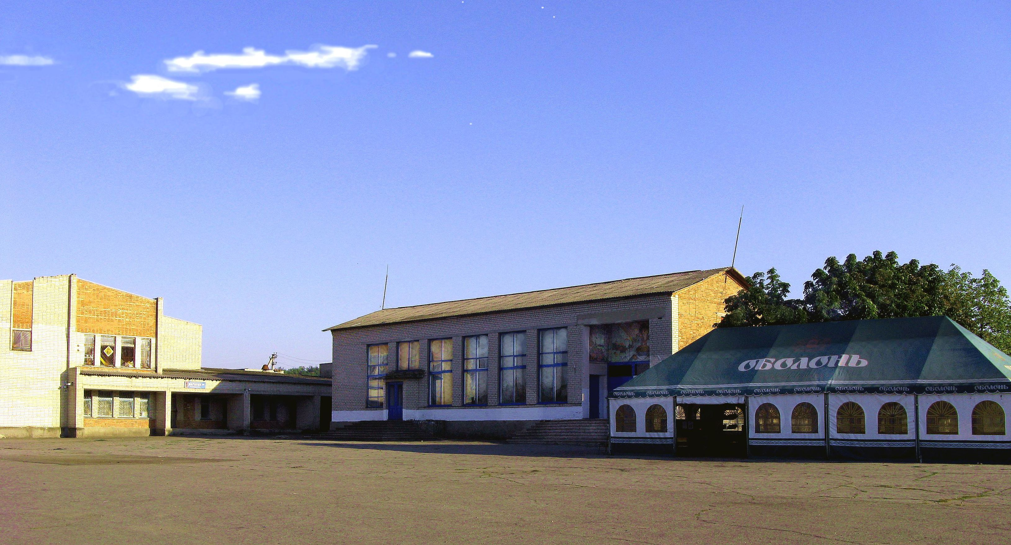 The central square of Katerinka village / Центральная площадь с.Катеринка